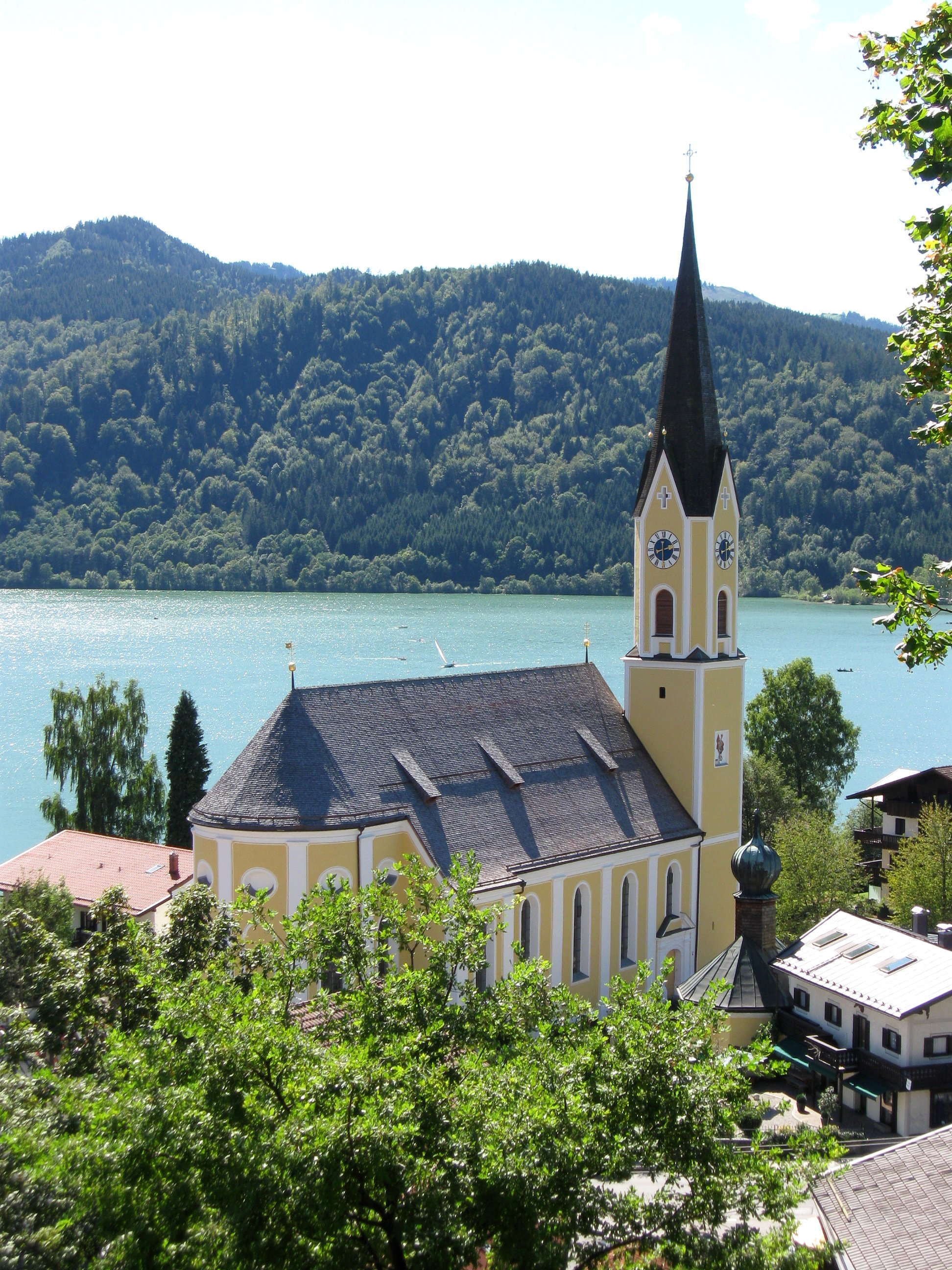 Seestraße 1; Katholische Pfarrkirche St. Sixtus, ehemalige Kollegiatsstiftskirche St. Sixtus, barocker Neubau 1712/1714 von Caspar Glasl, Stuckaturen und Fresken von Johann Baptist Zimmermann, Turm spätgotisch, 1466, Obergeschoss mit Spitzhelm, 1873; mit Ausstattung. D-1-82-131-23